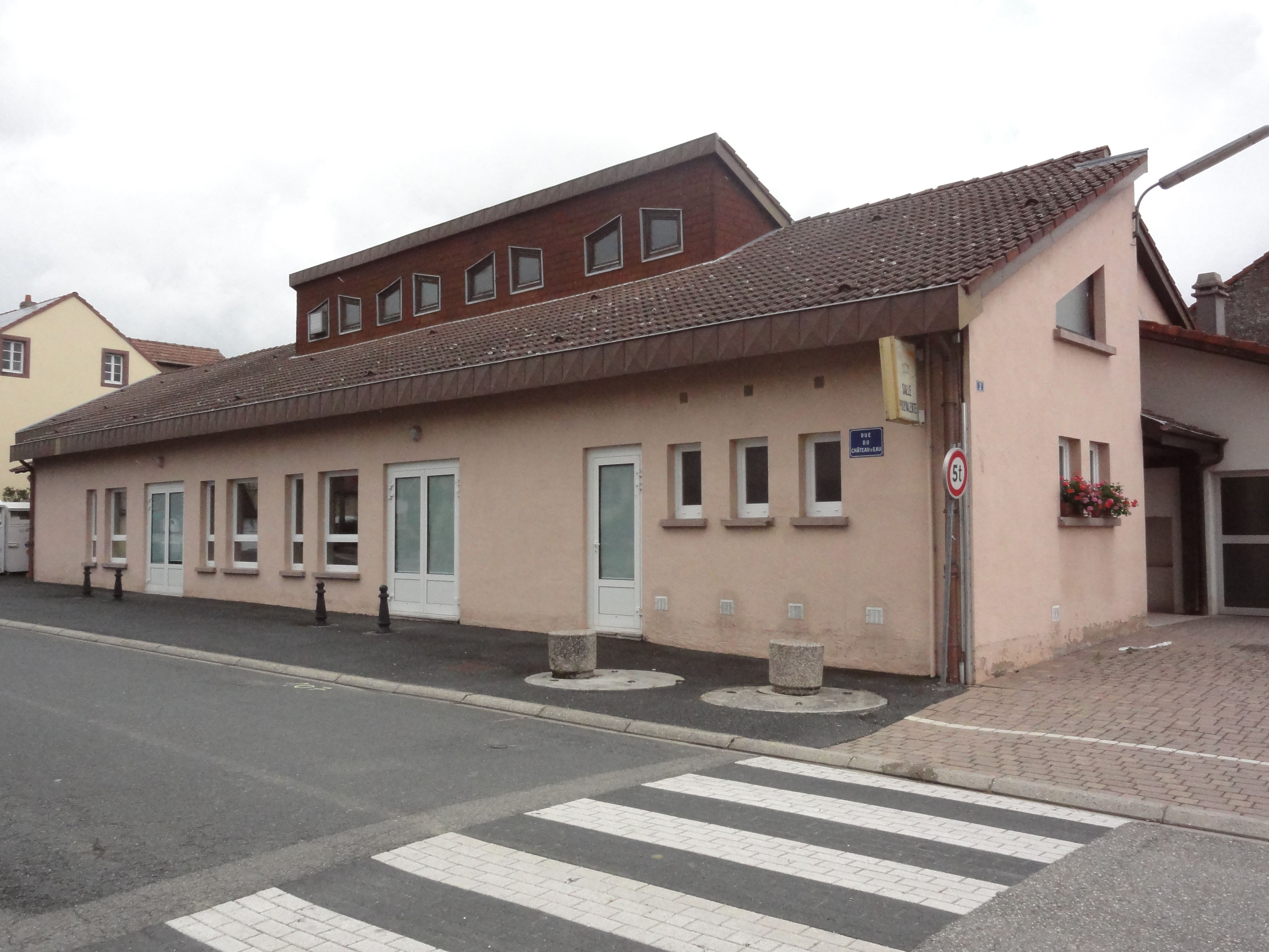 Zilling (Moselle) salle polyvalente